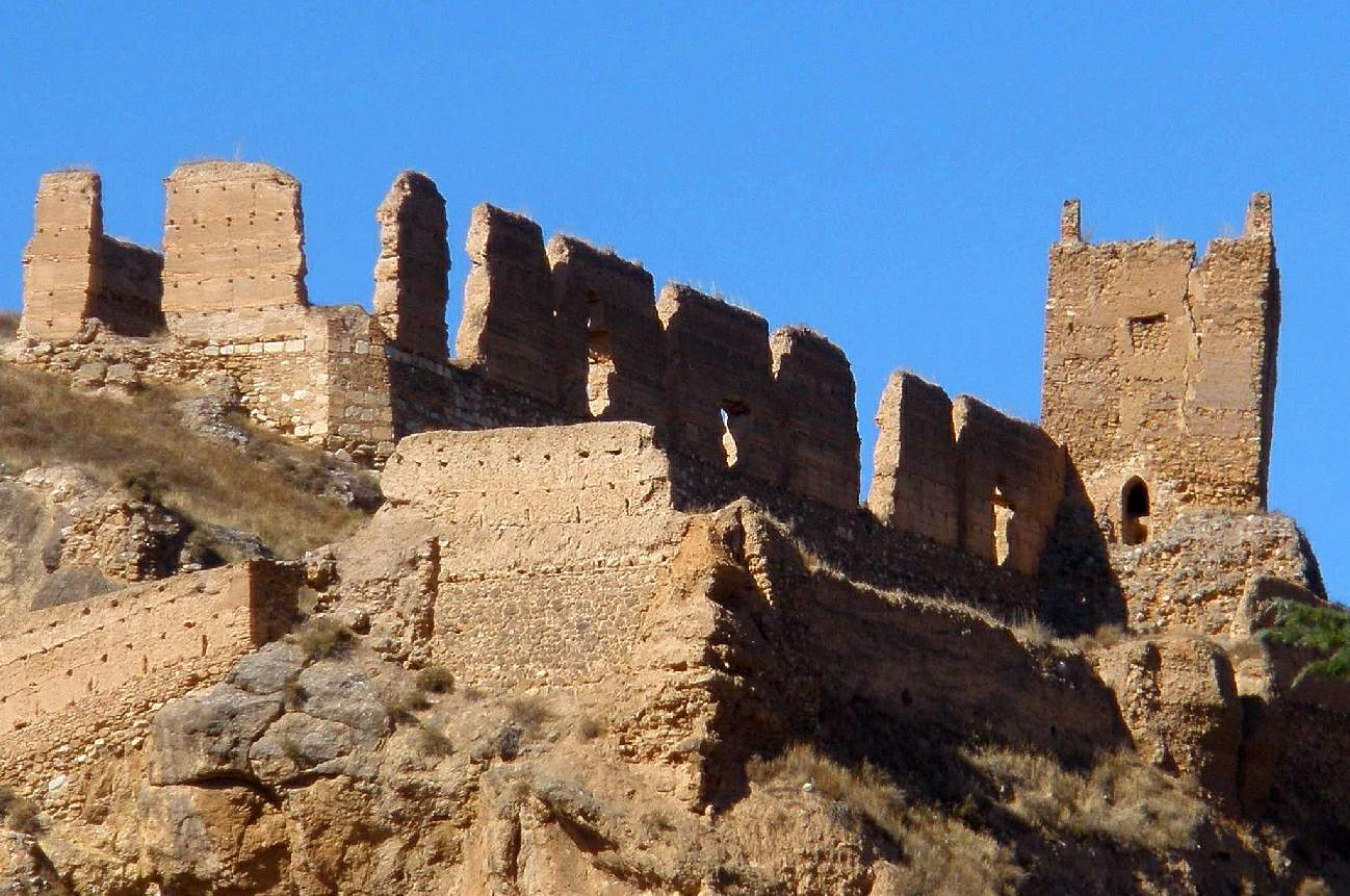 Recinto amurallado de Daroca (provincia de Zaragoza). Castillo Mayor See also: Castles in Spain.